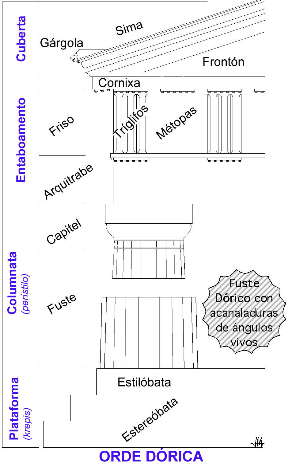 ORDE DÓRICA. Plataforma escalonada (krepis ou crepidoma); Columnata (periítilo);Fuste con acanaladuras de arestas vivas; Capitel: Astrágalo (sen collarino), Equino circular, Ábaco cadrado. Entaboamento: Arquitrabe liso. Friso: Tríglifos, Métopas. Cornixa, Cuberta, Frontón Veriente ou Sima